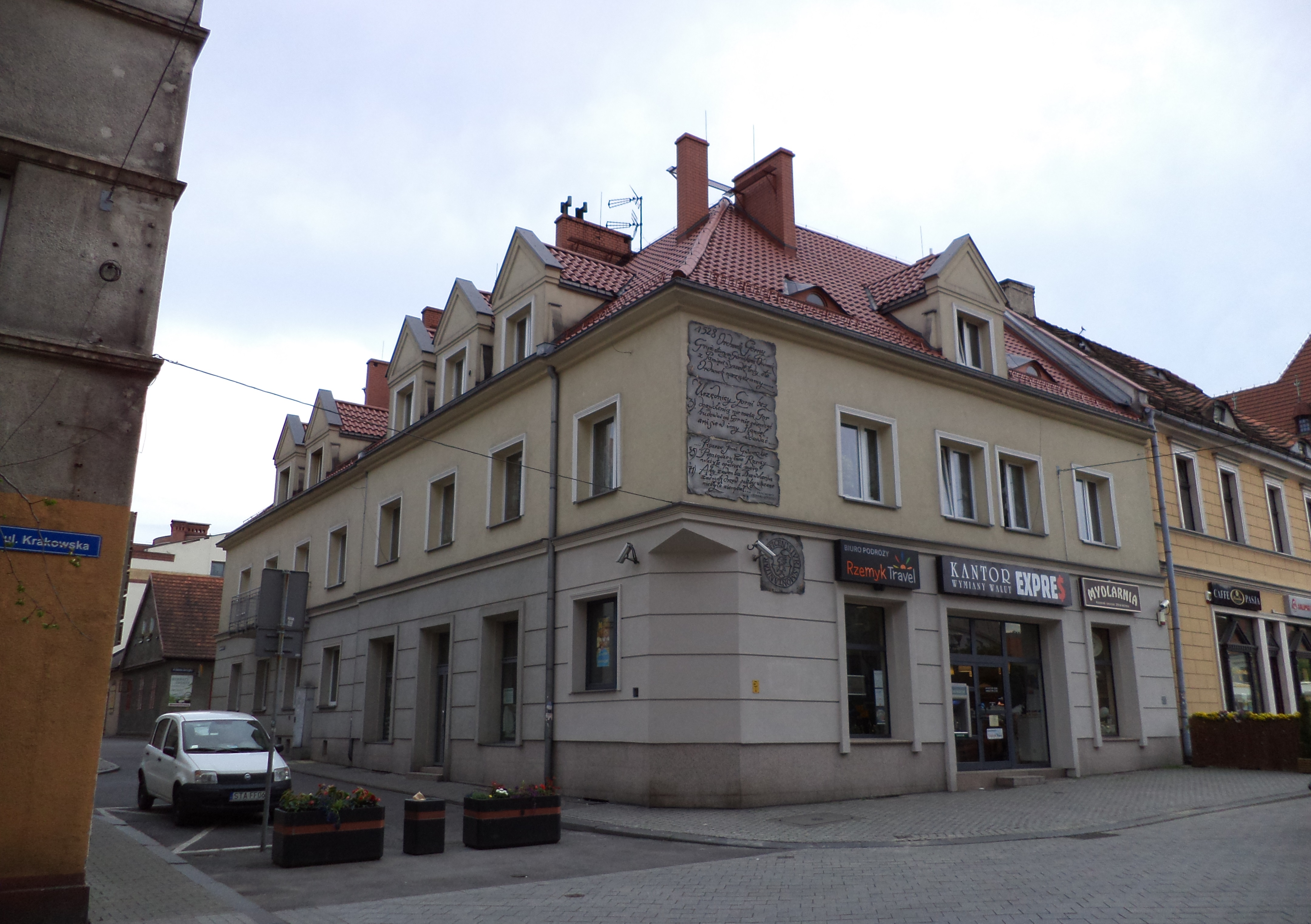 Dom mieszkalny przy ulicy Rynek 6 w Tarnowskich Górach